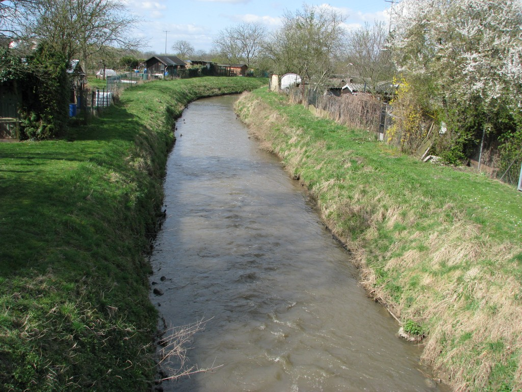 Leimbach in Brühl